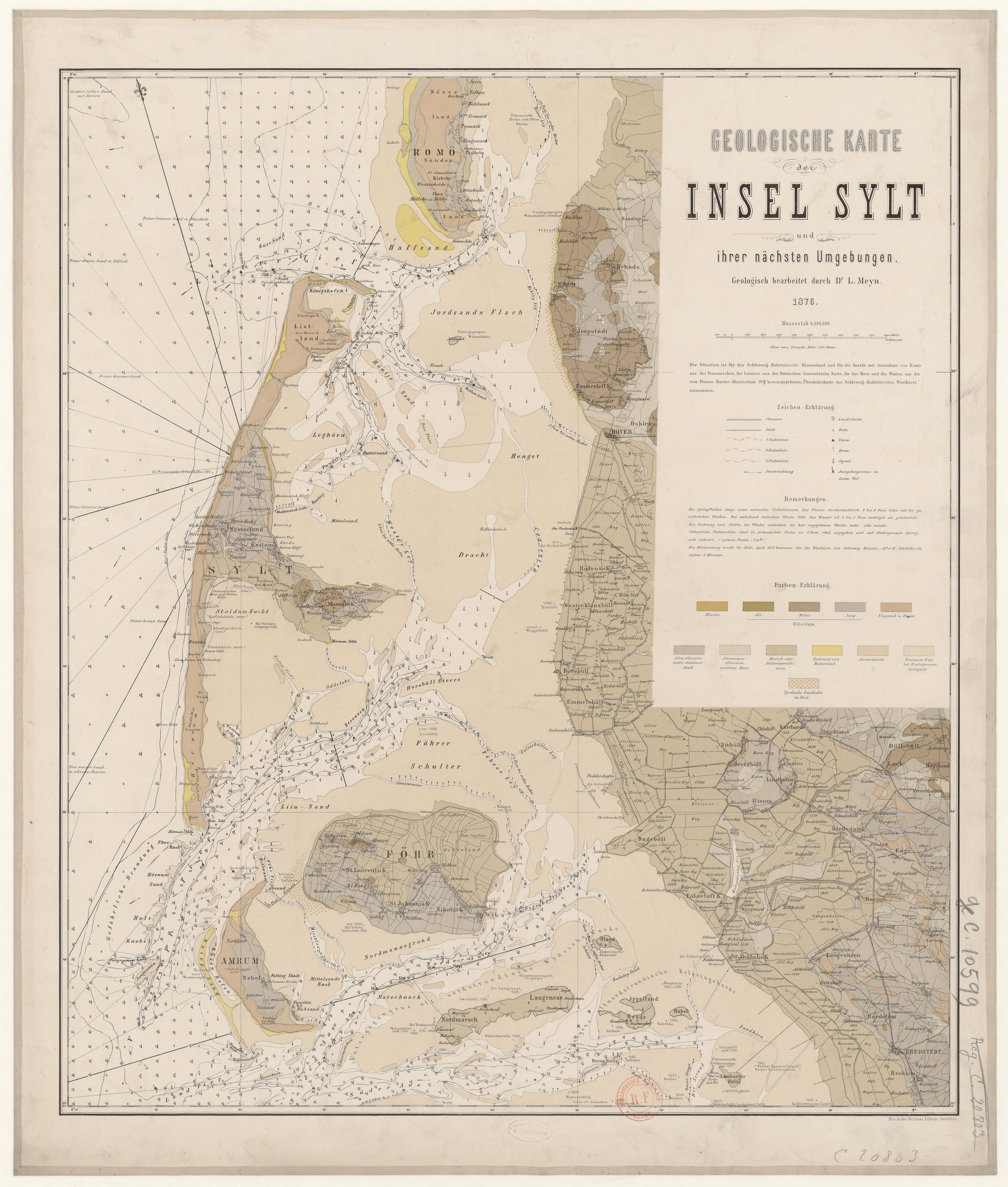 Geologische Karte der Insel Sylt und ihrer nächsten Umgebungen